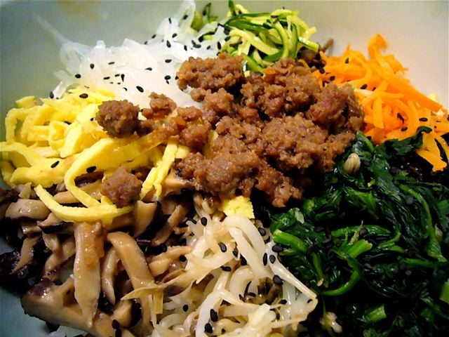 ビビンバ（米国ニューヨーク州ニューヨークの韓国料理店「Gahm Mi Oak ガンミオク」）Bibim Naeng Myun - 7 & 7 Korea